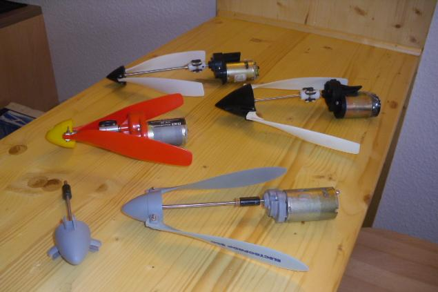 Frühe Elektroantriebe für den Modellflug Robbe/Graupner/Carrera